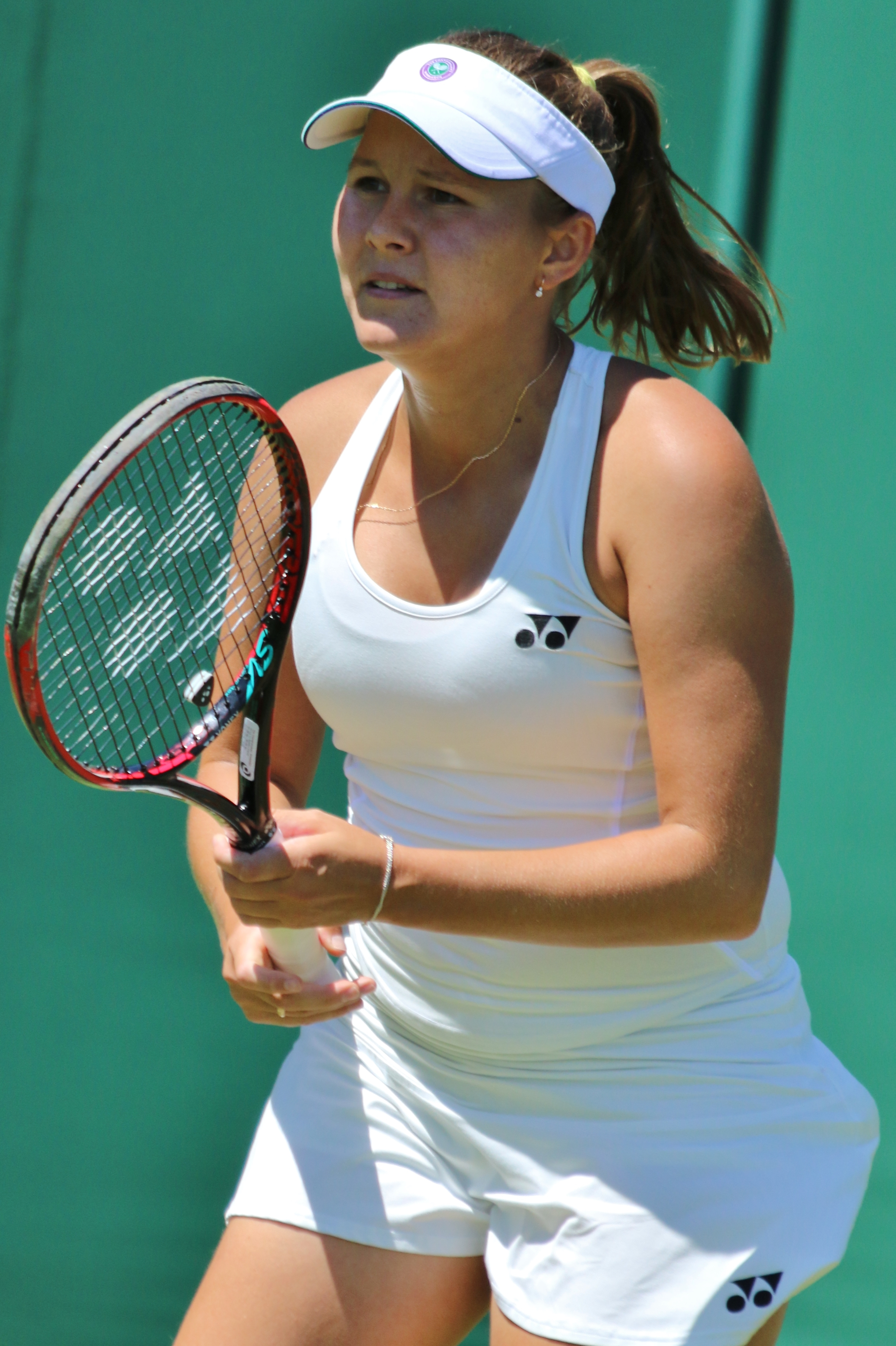 Rodina WM18 (32)